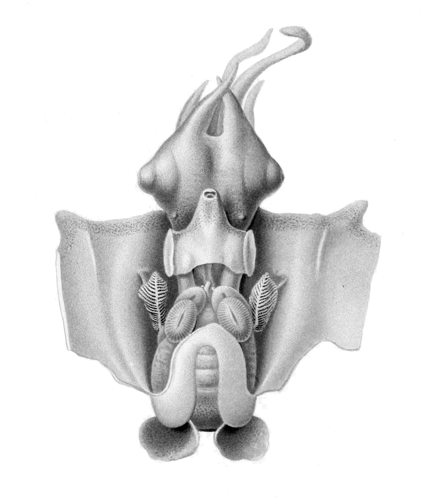 dissected Spirula spirula